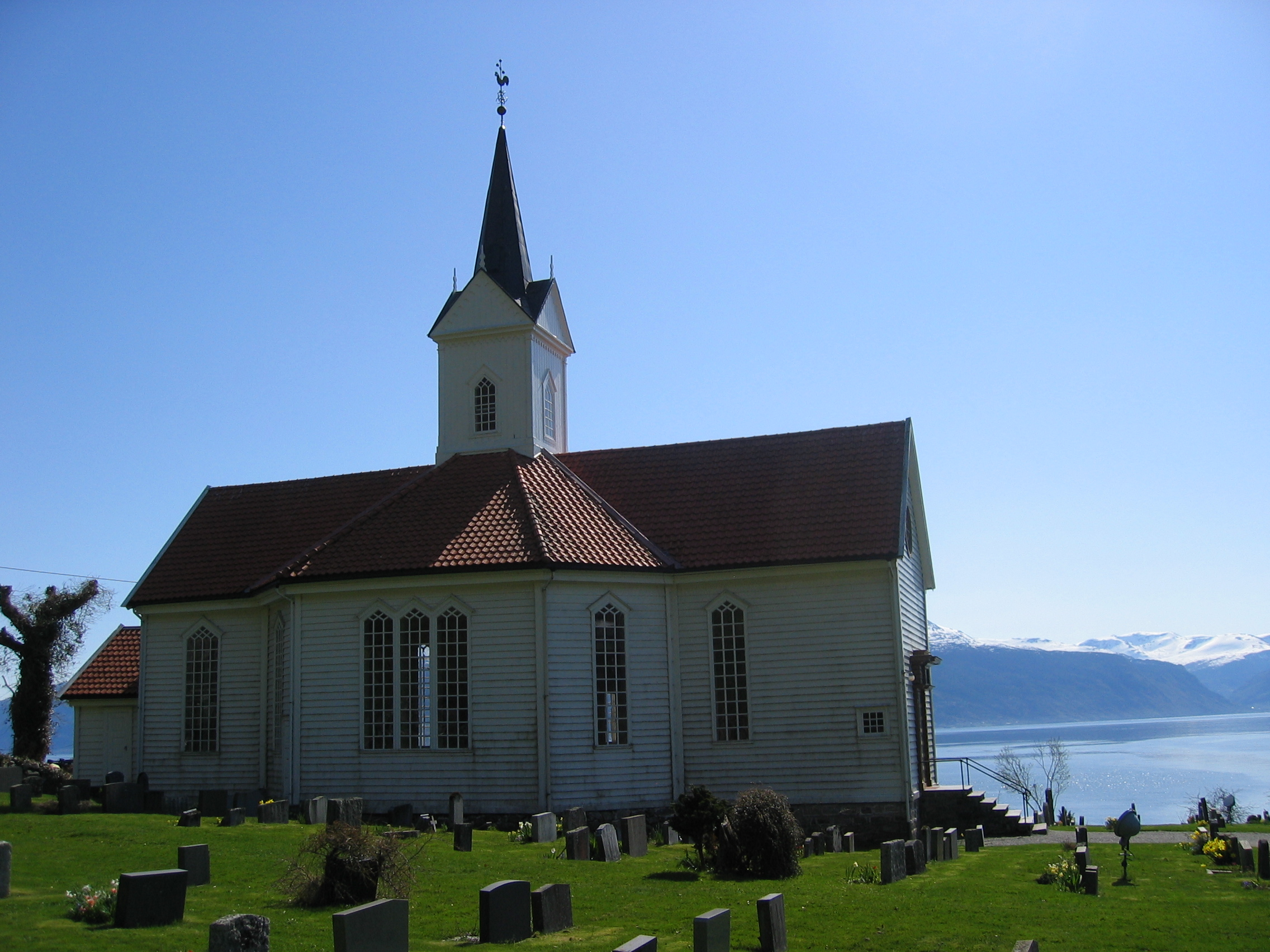 Tjugum kyrkje i Balestrand kommune